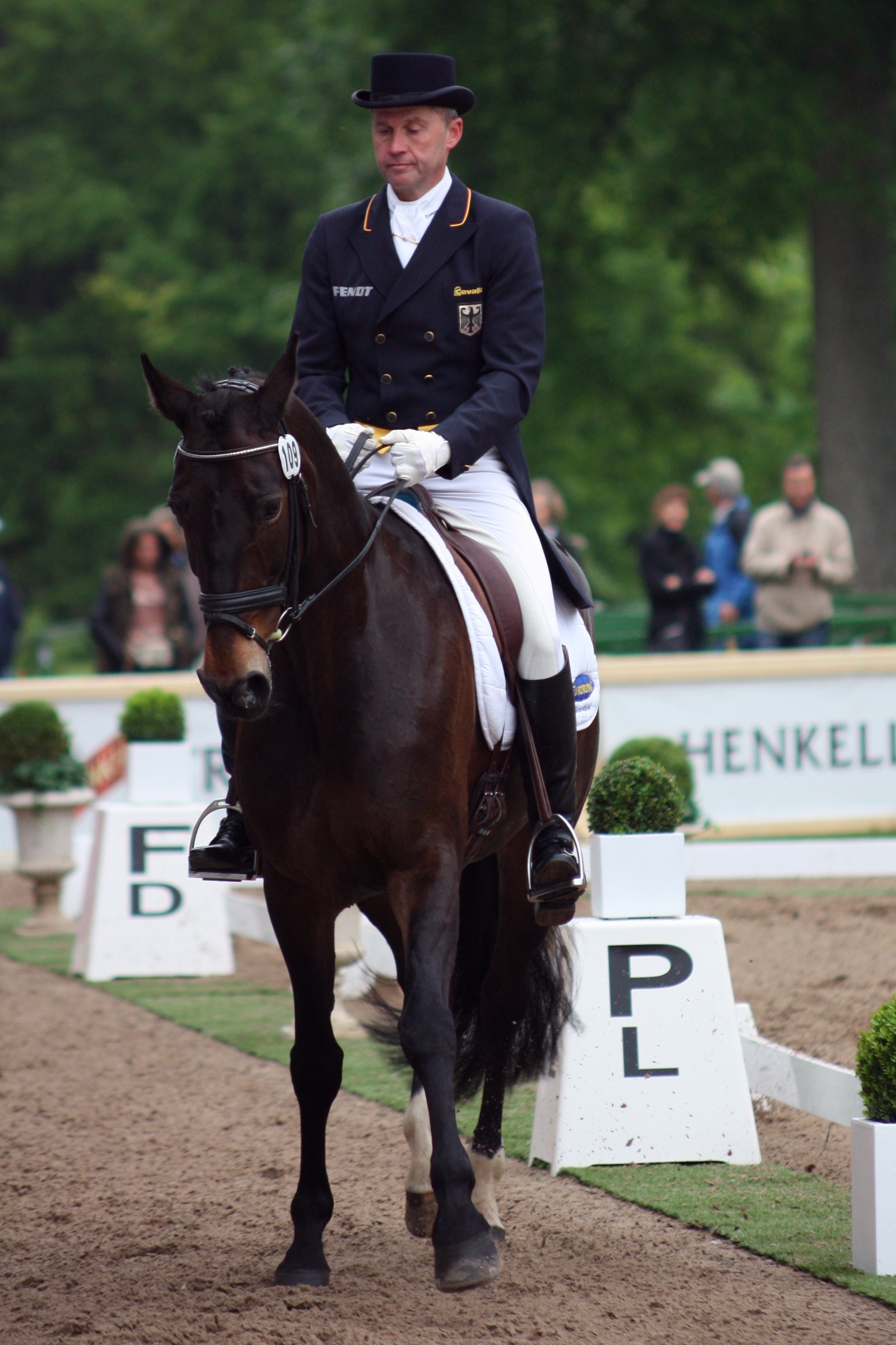 77. Internationanles Wiesbadener Pfingstunier 2013, CIC *** Vielseitigkeitsprüfung Dressur, Andreas Dibowski auf FRH Fantasia Personality rights warning Although this work is freely licensed or in the public domain, the person(s) shown may have rights that legally restrict certain re-uses unless those depicted consent to such uses. In these cases, a model release or other evidence of consent could protect you from infringement claims.